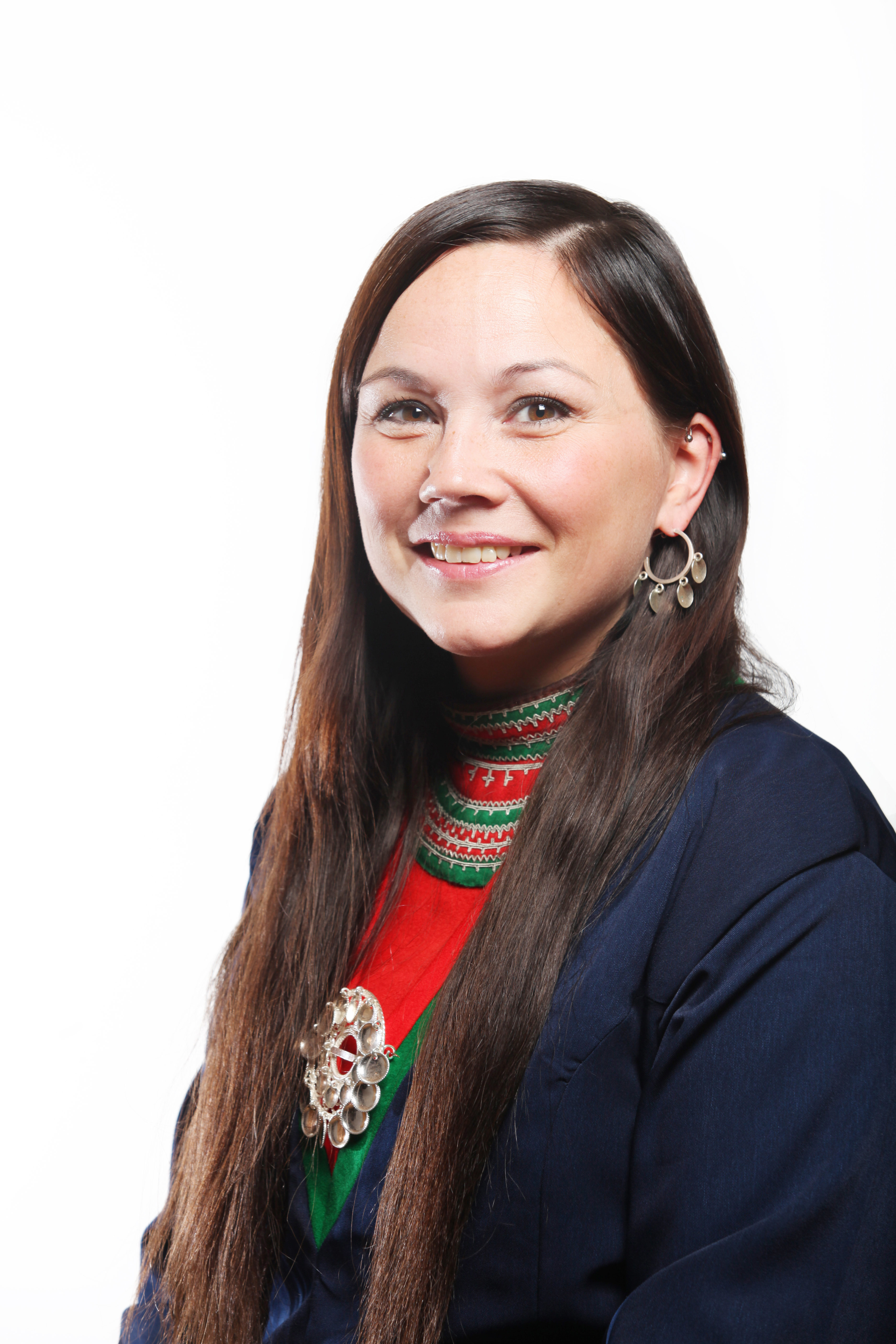 Leder av partiet Åarjel-Saemiej Gïelh. Leder av oppvekst-, omsorgs-, og utdanningskomitéen og medlem av valgkomitéen. Foto: Kenneth Hætta / Sametinget.